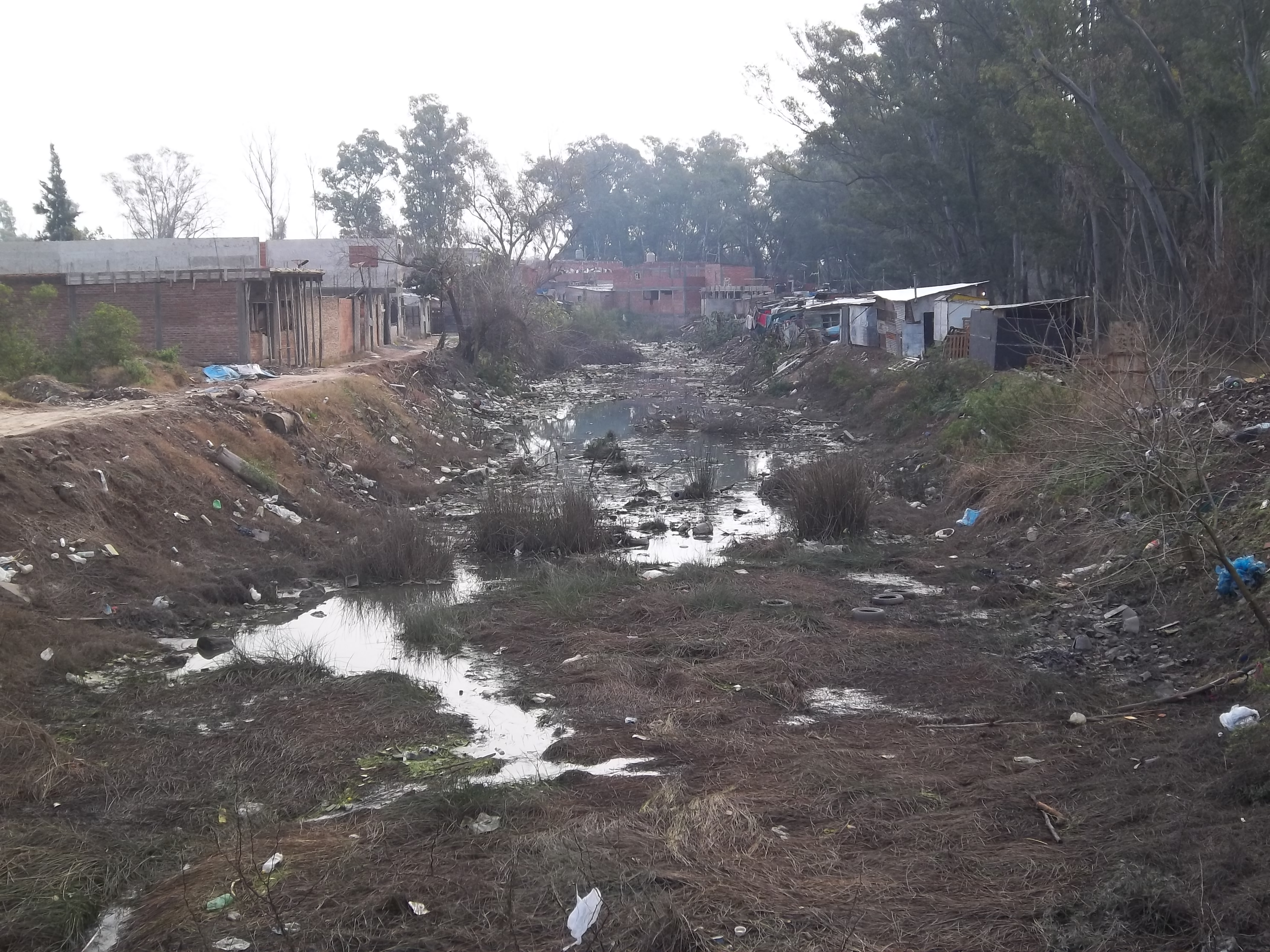 Cauce antiguo del Río Matanza en Villa La Salada, Tapiales, partido de La Matanza, provincia de Buenos Aires, Argentina.